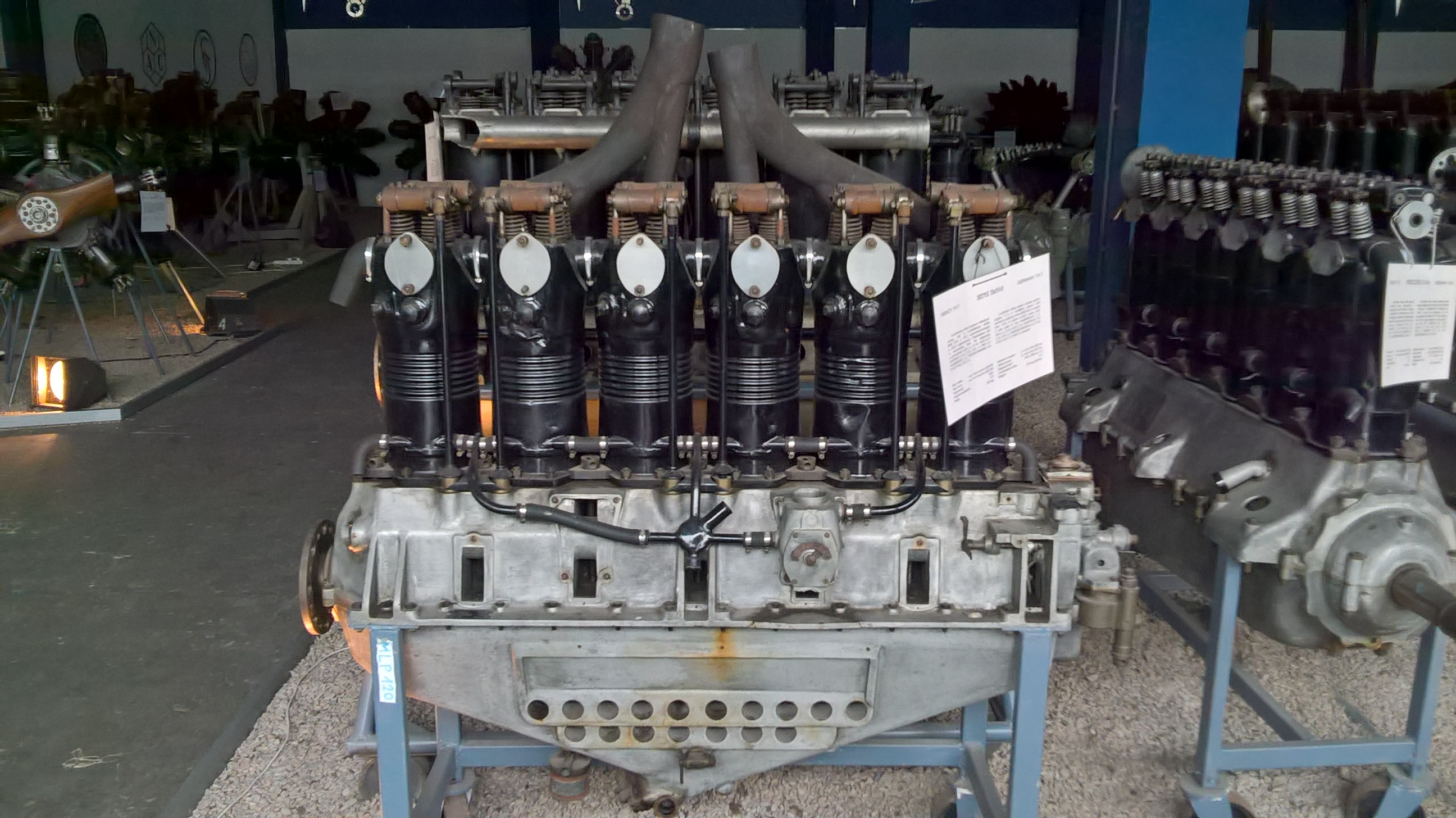 Niemiecki 6-cylindrowy silnik rzędowy Benz Bz.IVd z 1917 r., eksponowany w Muzeum Lotnictwa Polskiego w Krakowie.